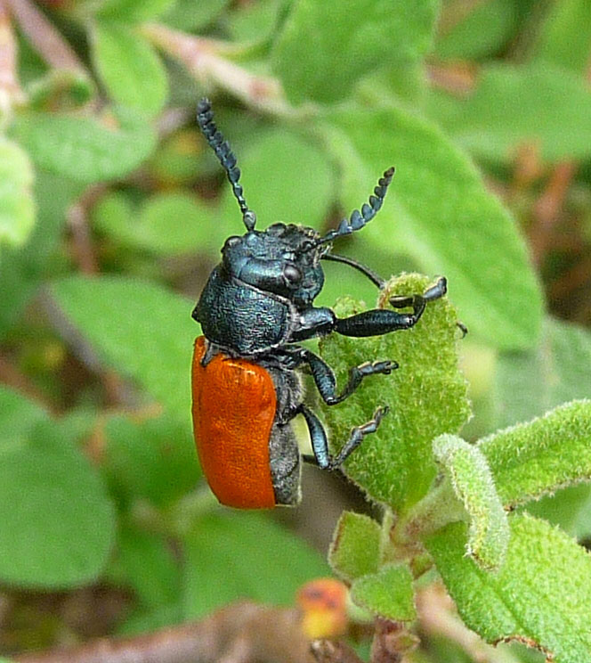 Labidostomis taxicornis. Male. Chrysomelidae